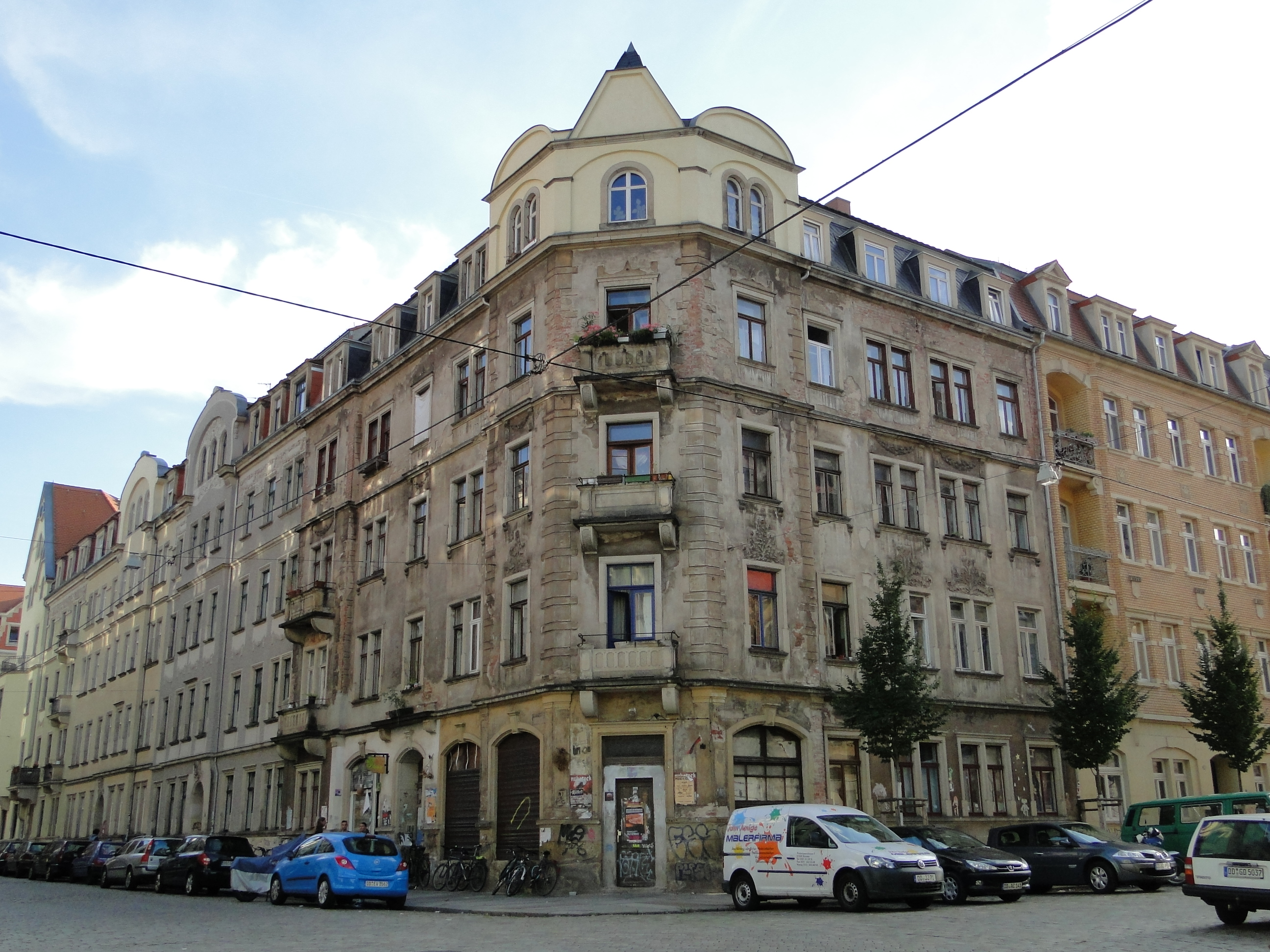 Kulturdenkmal Rudolfstraße 7 Dresden